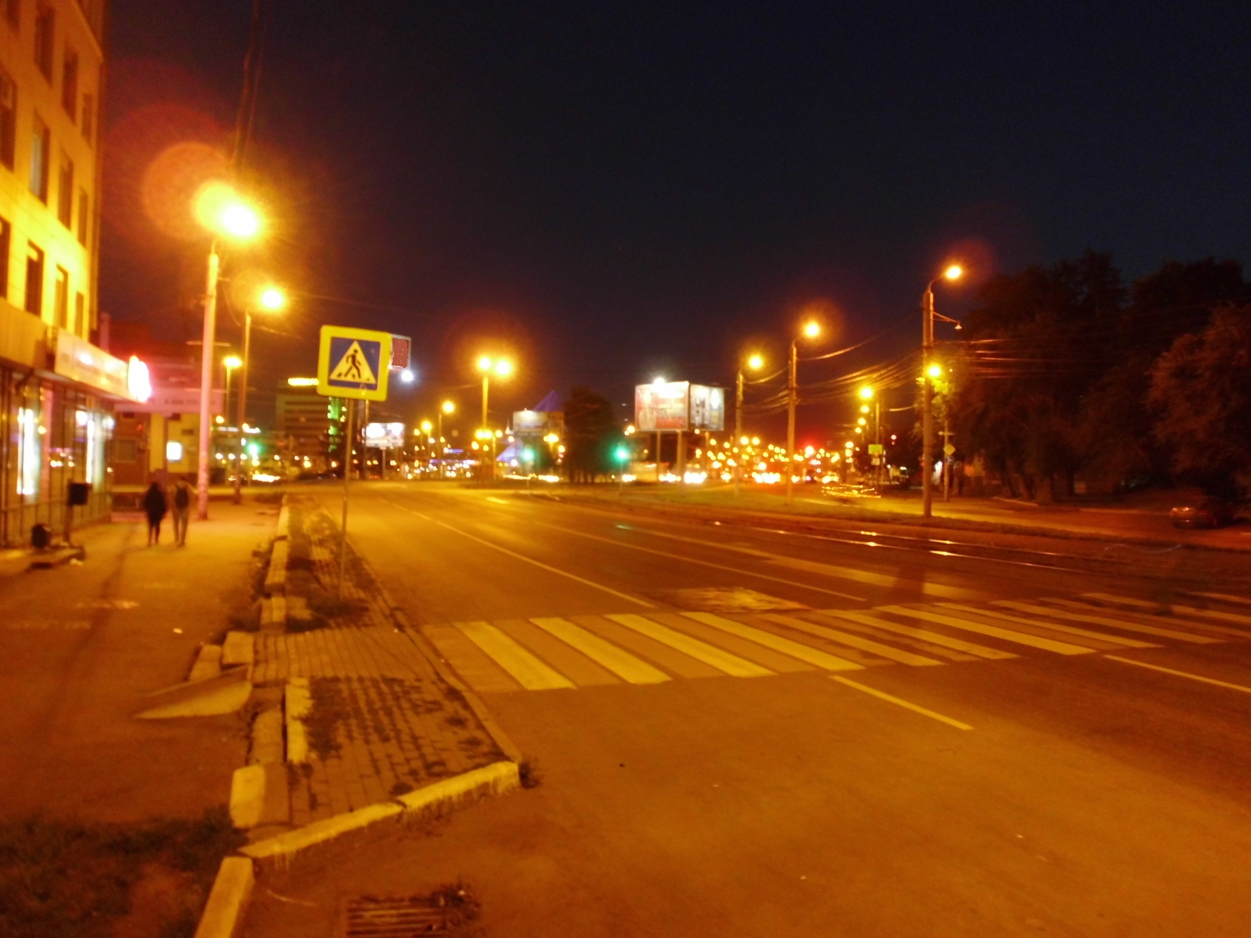 Окончание улицы Цвиллинга и её переход в улицу Степана Разина (далее направо на фото). Слева примыкание проезда с улицы Свободы. Прямо на дальнем плане (на фото) - Привокзальная площадь.